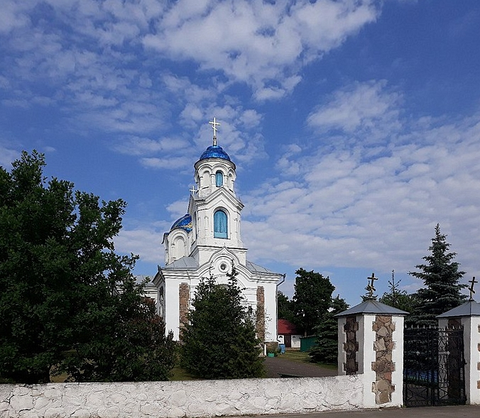 Пакроўская царква